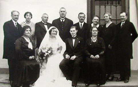 Krémer Manci esküvője